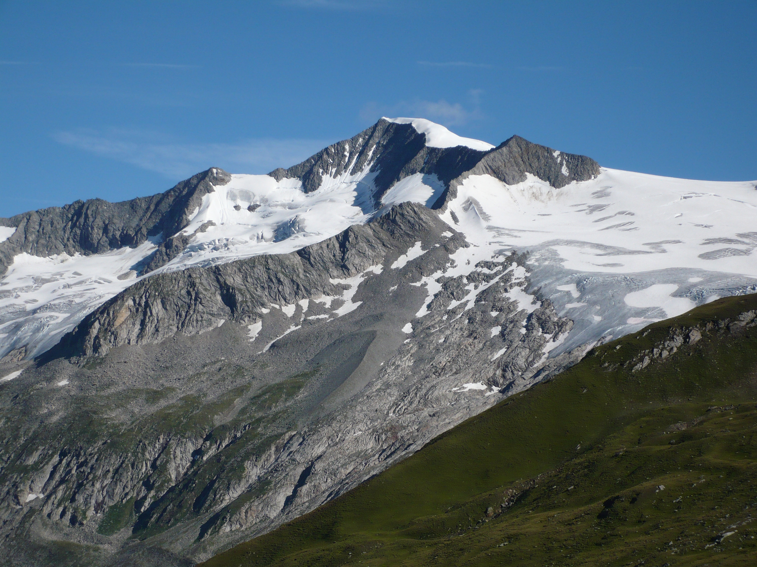 Großvenediger von Süden